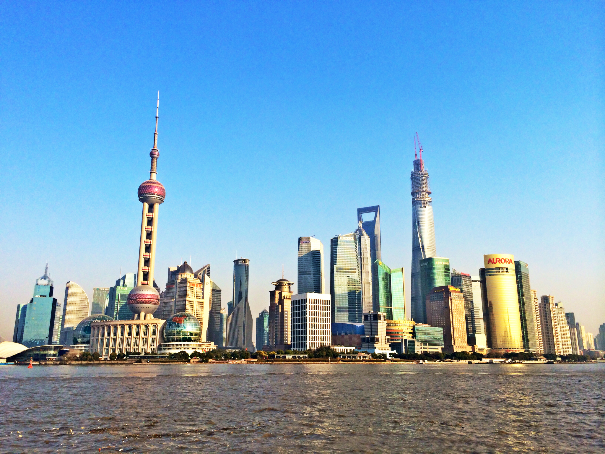 Shanghai Pudong Jan 2 2014